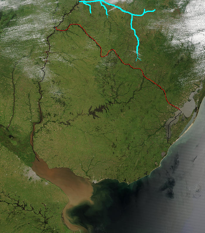 Foto de Uruguay tomada desde satélite. Se aprecian claramente los límites con Brasil en rojo, y el Río Ibicuí en celeste.